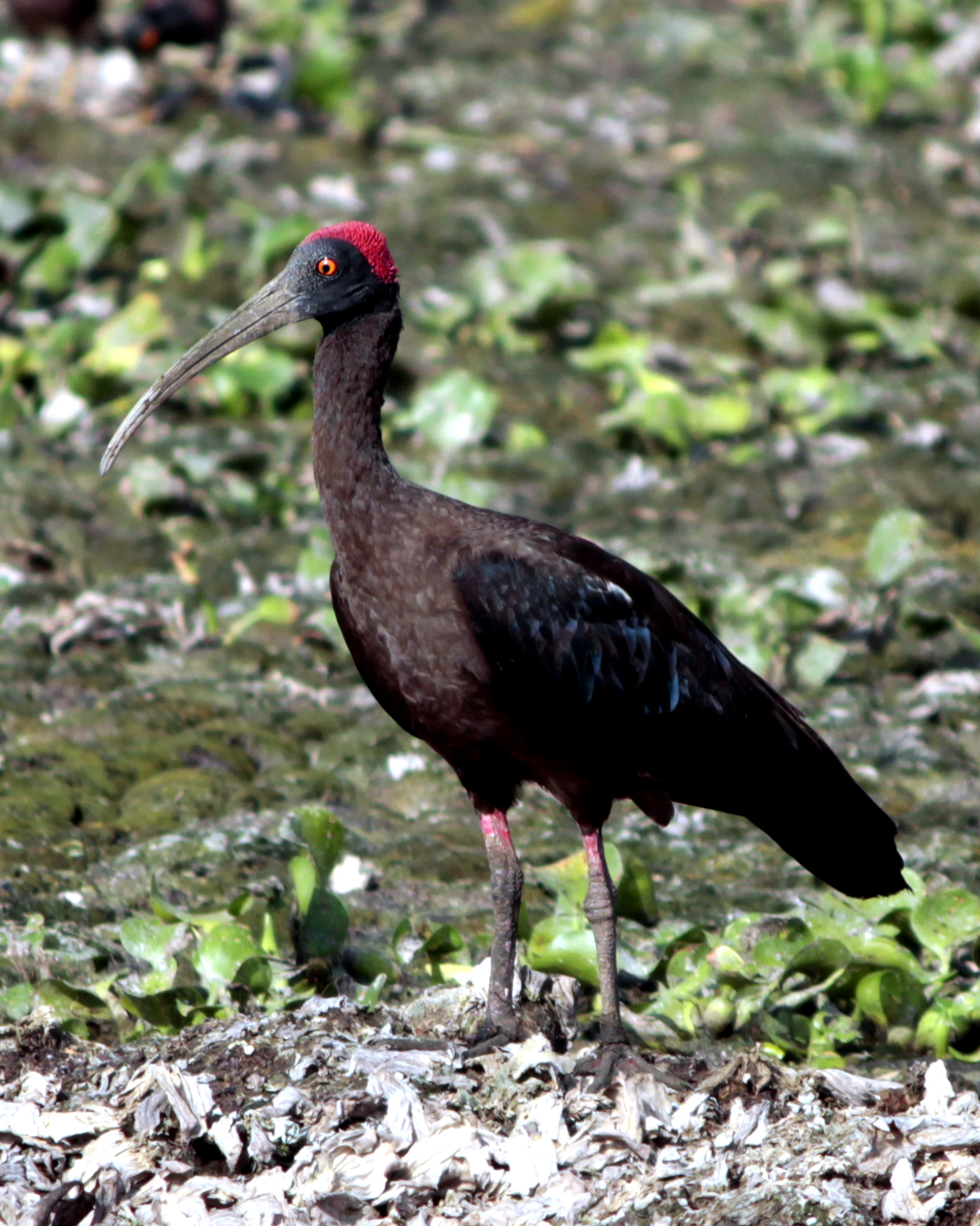 പക്ഷി: ചെമ്പൻ ഐബിസ്. സ്ഥലം : Pashan Lake, Pune. Pashan Lake (